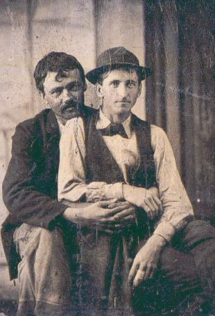 Affectionate male Valentine couple